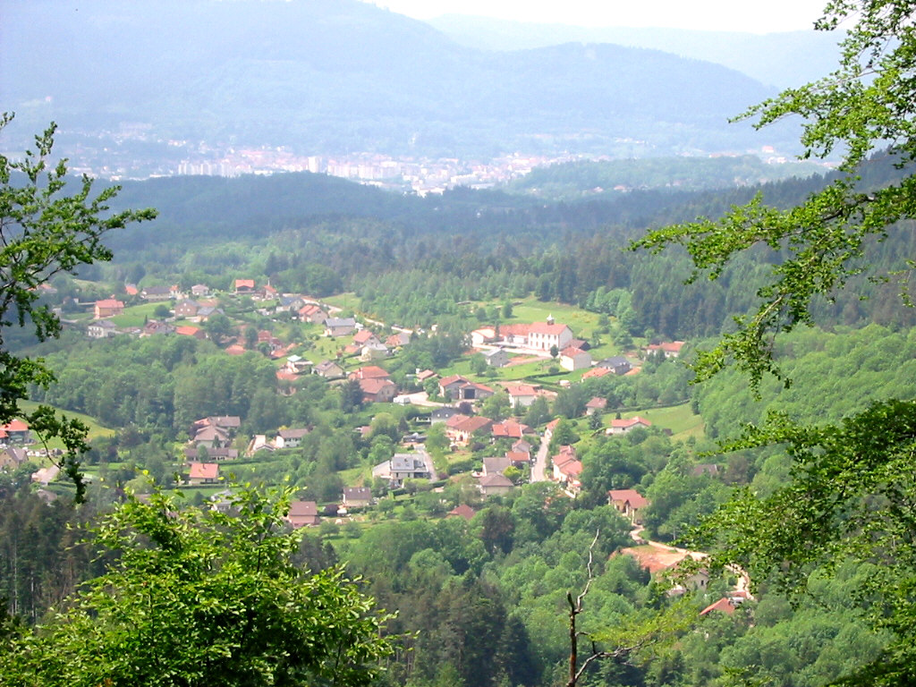 Nayemont-les-Fosses Commune des Vosges Vue de la route forestière du Spitzemberg Au fond, Saint-Dié-des-Vosges Photo personnelle du 4 juin 2006. Copyright © Christian Amet